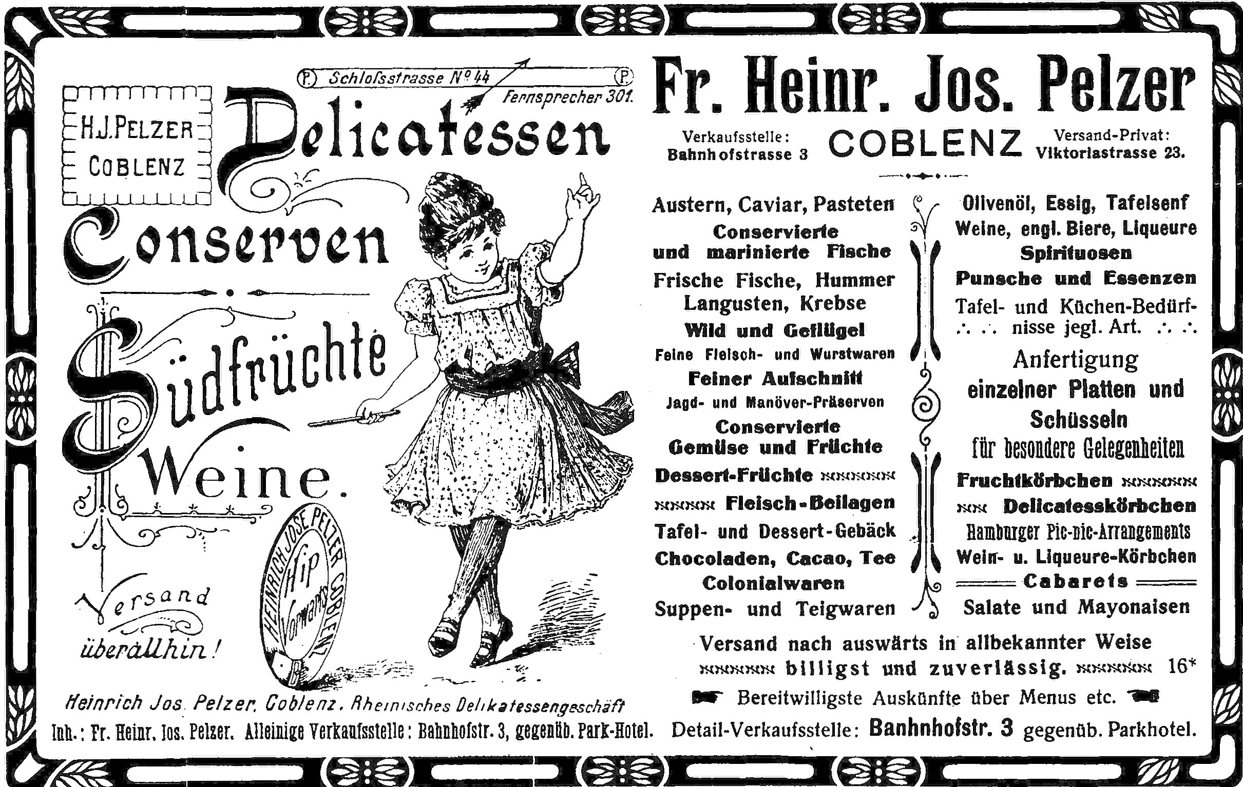 Werbeanzeige des Koblenzer Delikatessengeschäftes Pelzer 1909